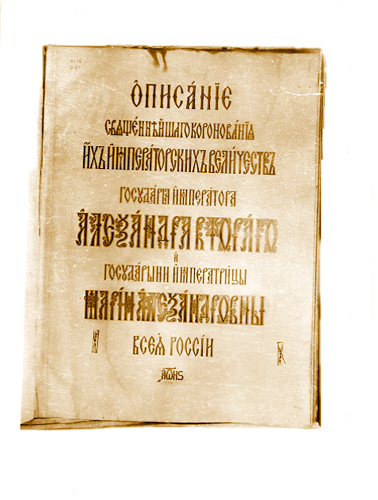 Титульный лист альбома